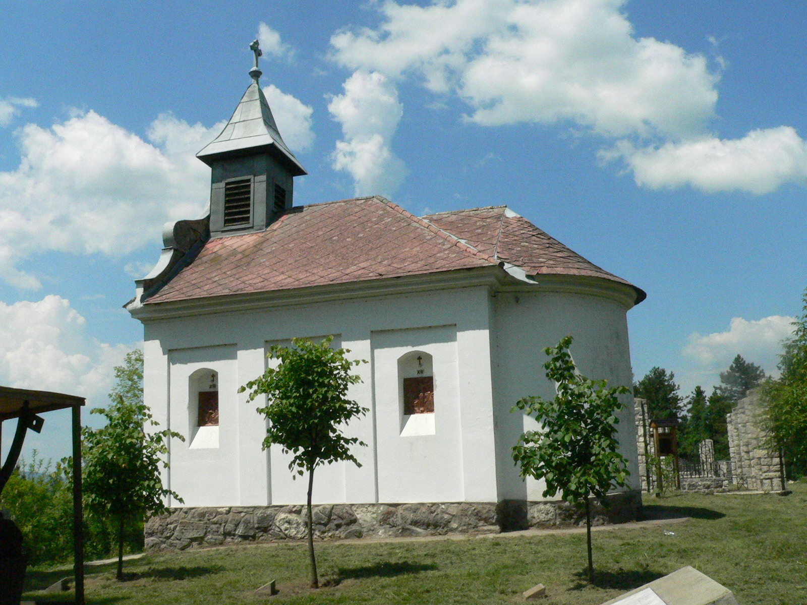 Zebegény, Kálvária-kápolna, klasszicista, 1853, Műemléki azonosító: 7613 törzsszám: 7515 This is a photo of a monument in Hungary. Identifier: 7613